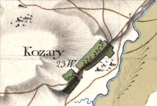 Oryginał znajduje się w Staatsbibliothek Berlin, sygn. 17030 sekt 111. Mapę Nowych Prus Wschodnich wykonano w 135 arkuszach, indeks zawiera 122 arkusze. Na terenie miejscowości były 23 budynki mieszkalne.